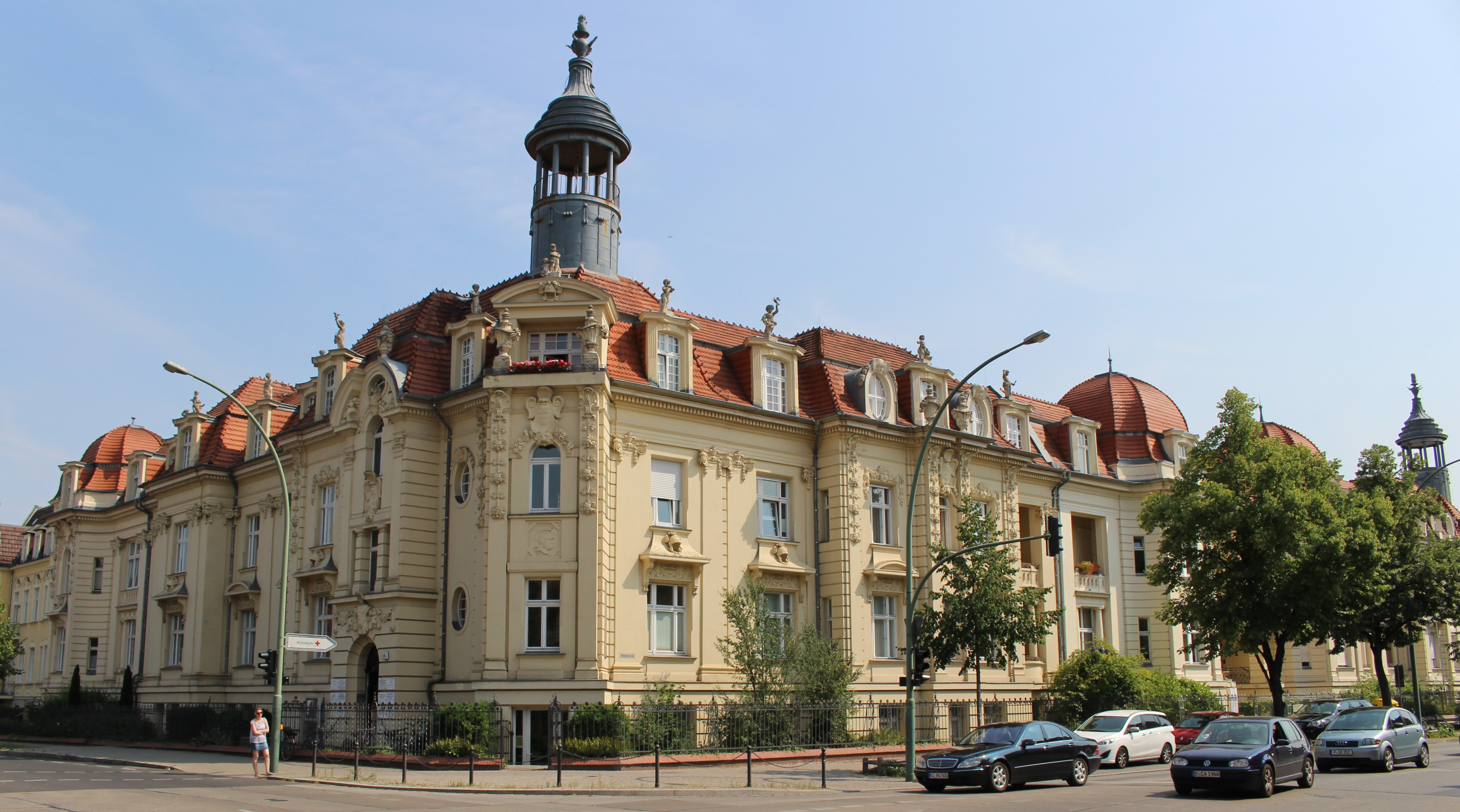 Haus, Kurfürstenstraße 19 in Potsdam